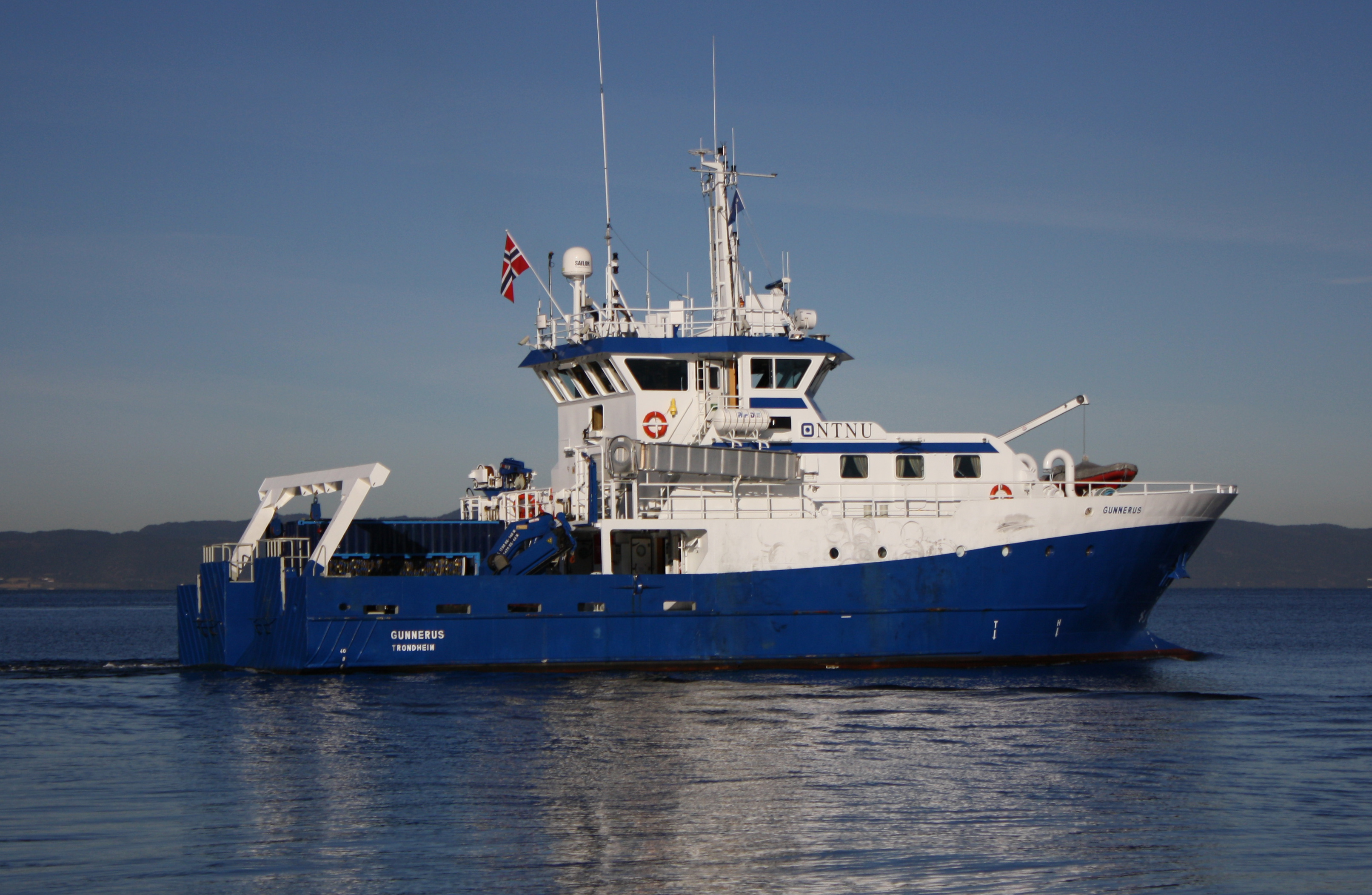 NTNUs forskningsfartøy Gunnerus utenfor Trondheim.